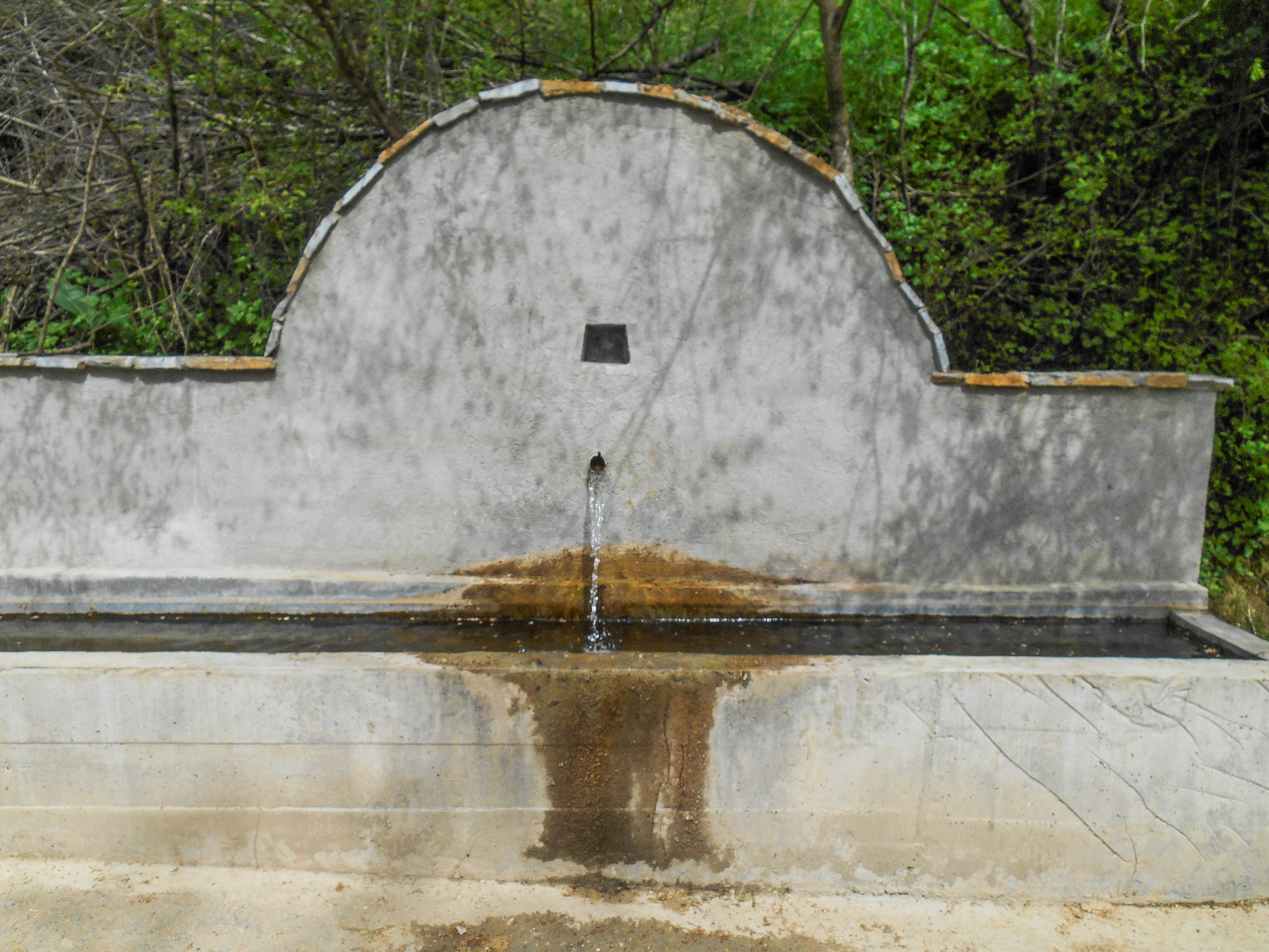 Селска чешма